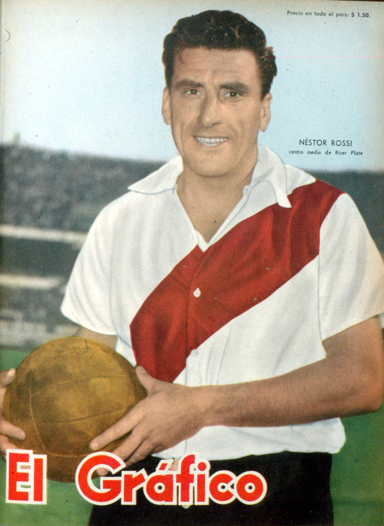 El Grafico del 10 de Junio de 1955. Edicion 1869